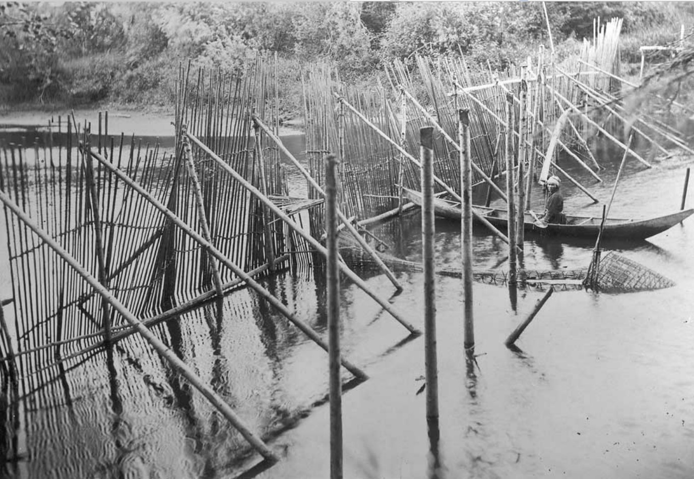 Ловля рыбы хантами. Разнообразные ловушки использовались для блокирования пути возвращения рыбы из их нерестилища. 1898-1900 гг. Сибирская этнографическая экспедиция Уно Тави Сирелиуса.